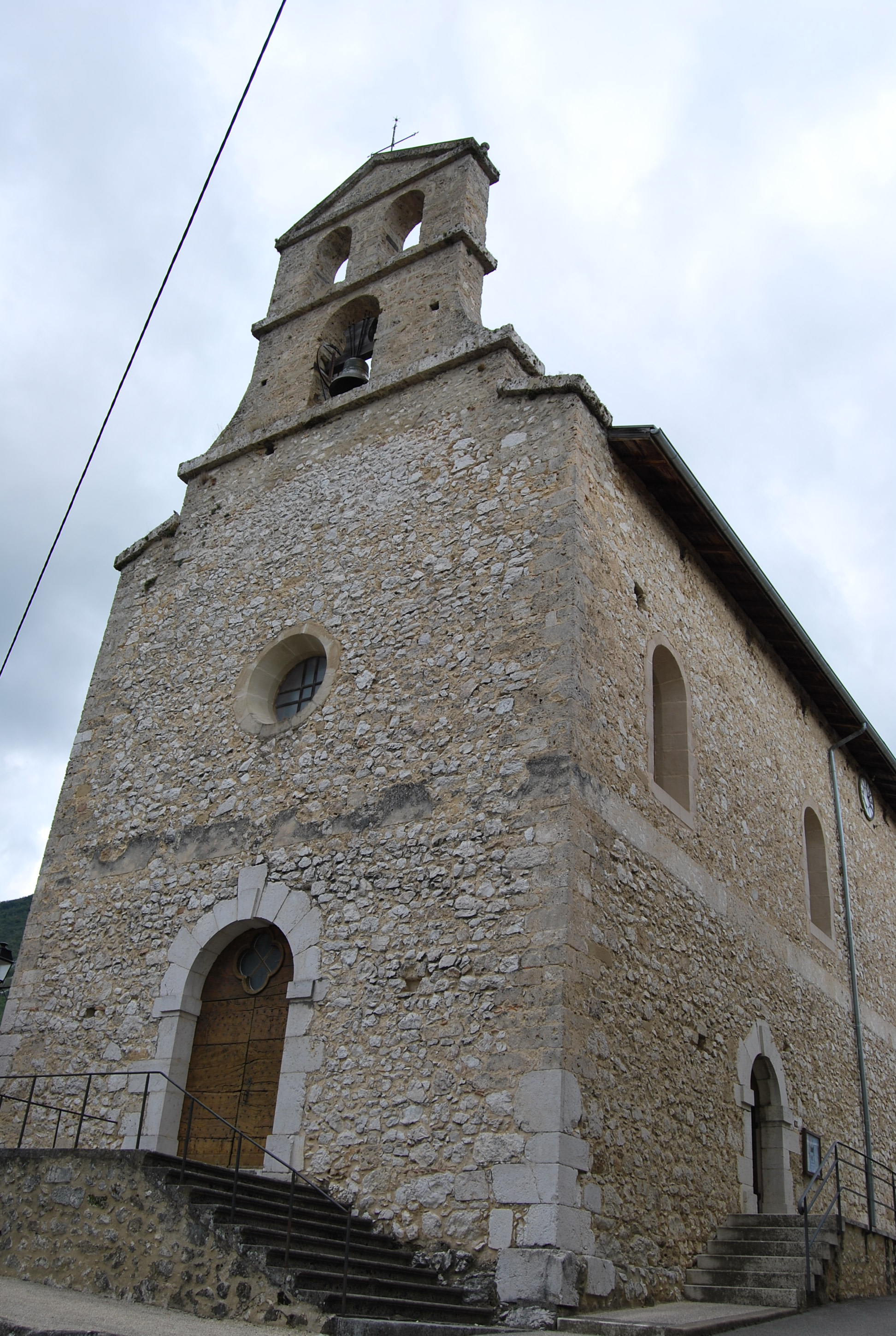 Eglise de Saint-André Saint-André-en-Royans